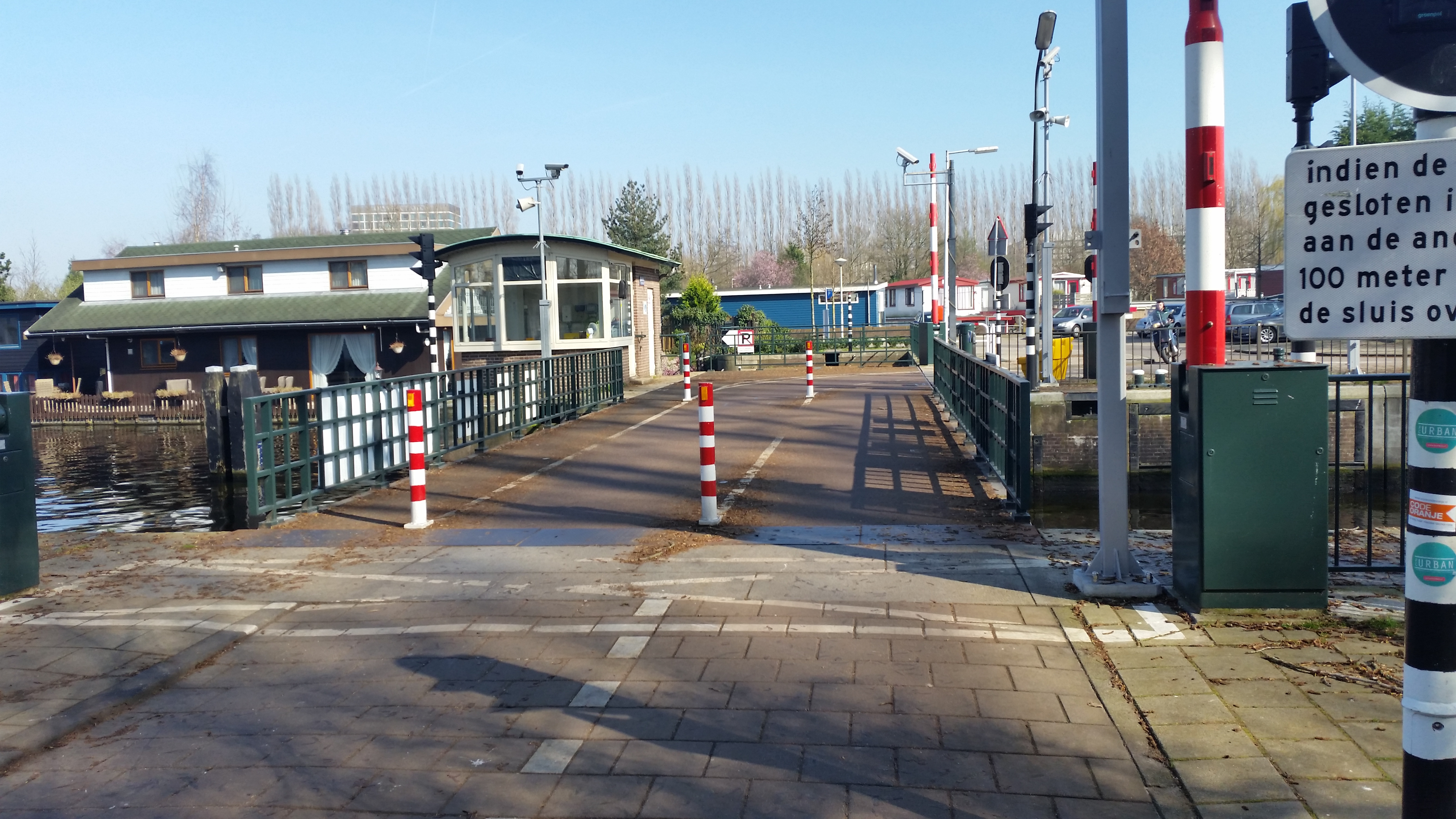 Nieuwe Meersluis